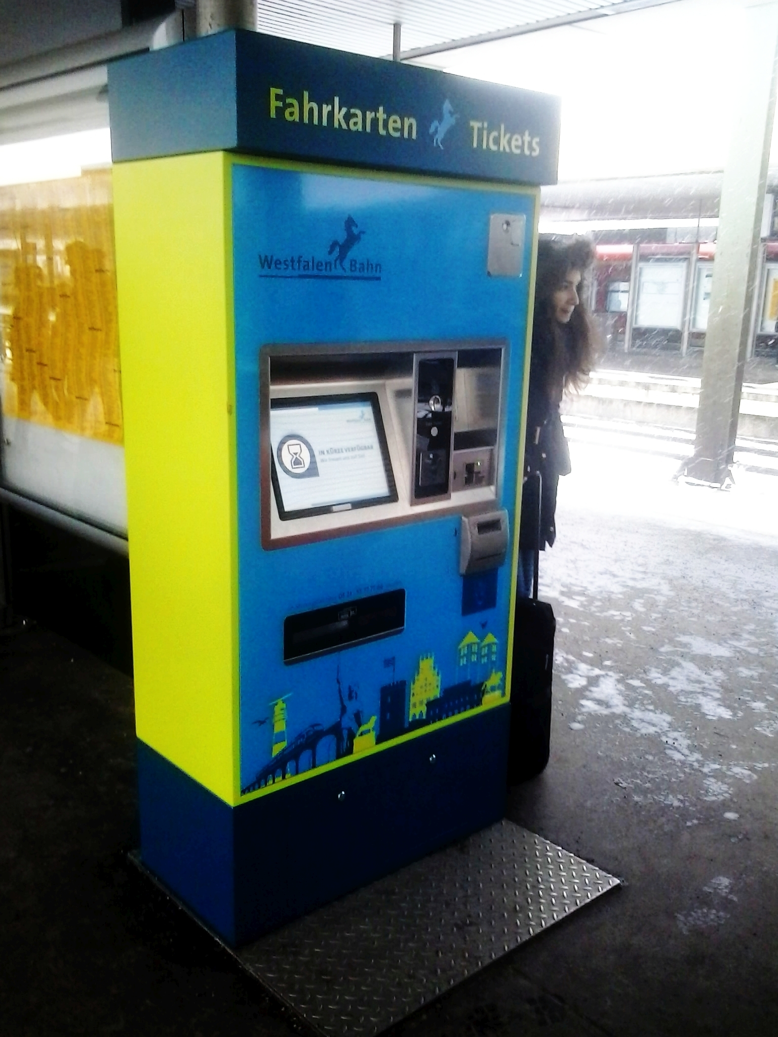 Fahrkartenautomat der Westfalenbahn in Hannover Hbf